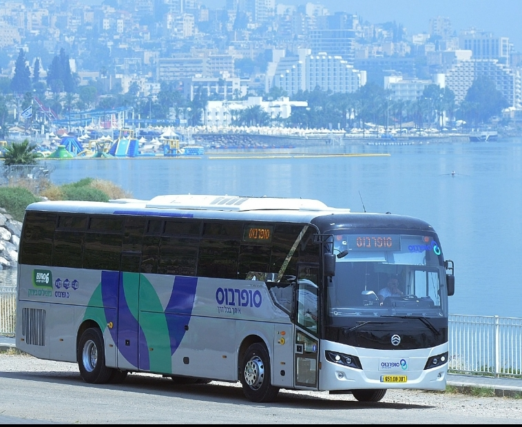 אוטובוס גולדן דרגון